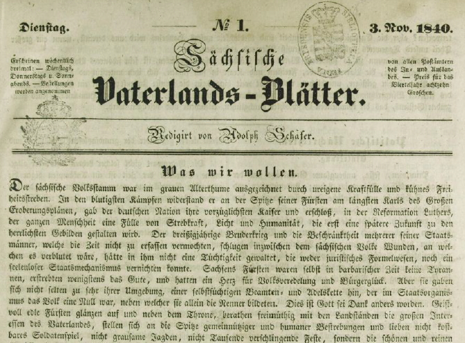 Titelseite der Erstausgabe der Sächsischen Vaterlandsblätter